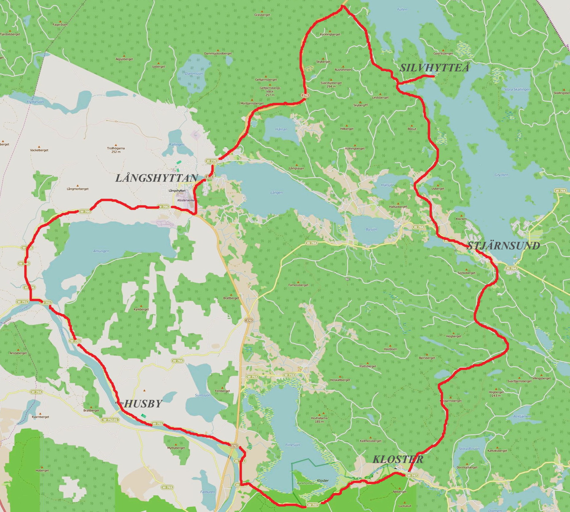 Karta för Husbyringen. Bakgrundskarta är från "Open street map"